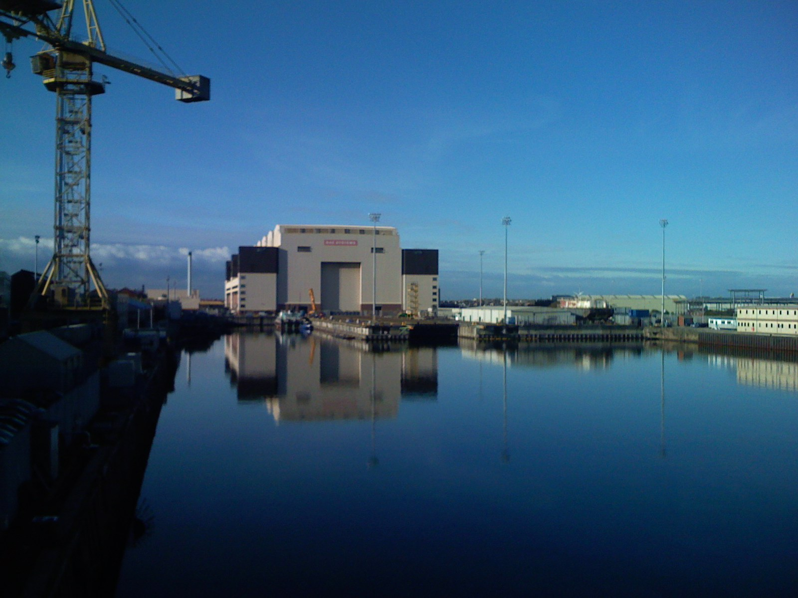 Also taken on my iPhone